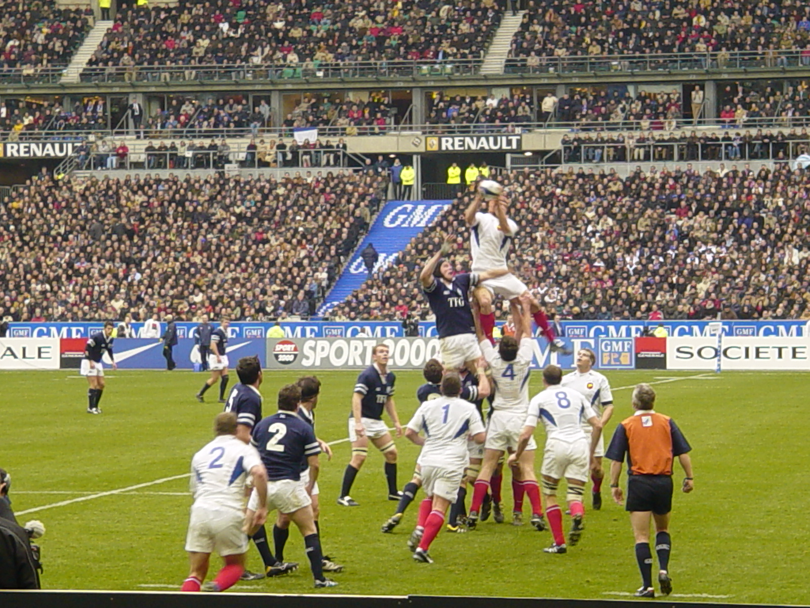 France-Ecosse en 2004